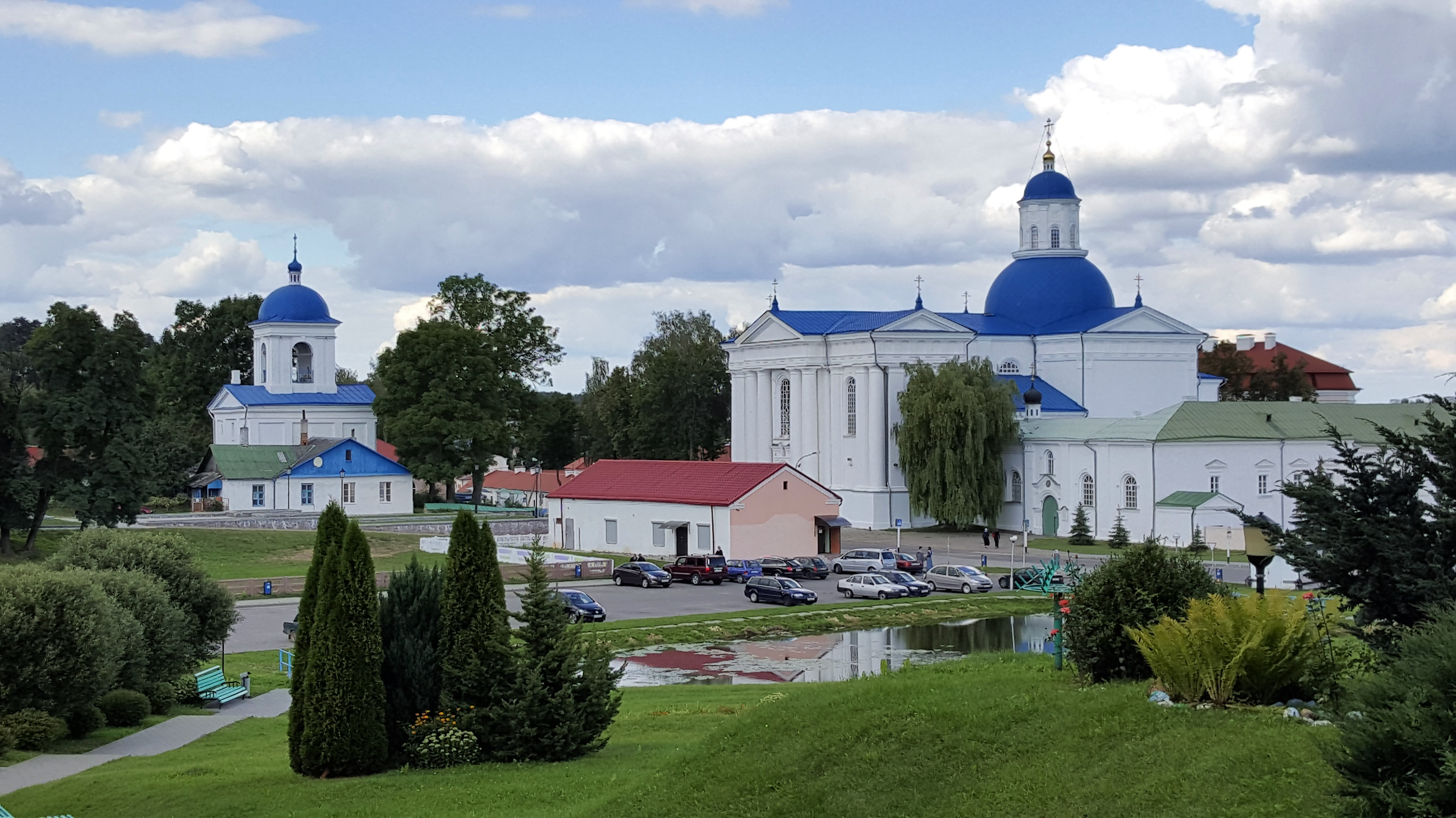 Die Hauptkirche des Mariä-Entschlafensklosters in Schyrowizki (russ: Schirowitschi) in Belarus